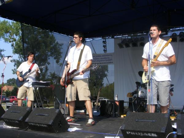 Check-Point zenekar saját fotó Koncert